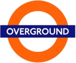 Logotipo de London Overground